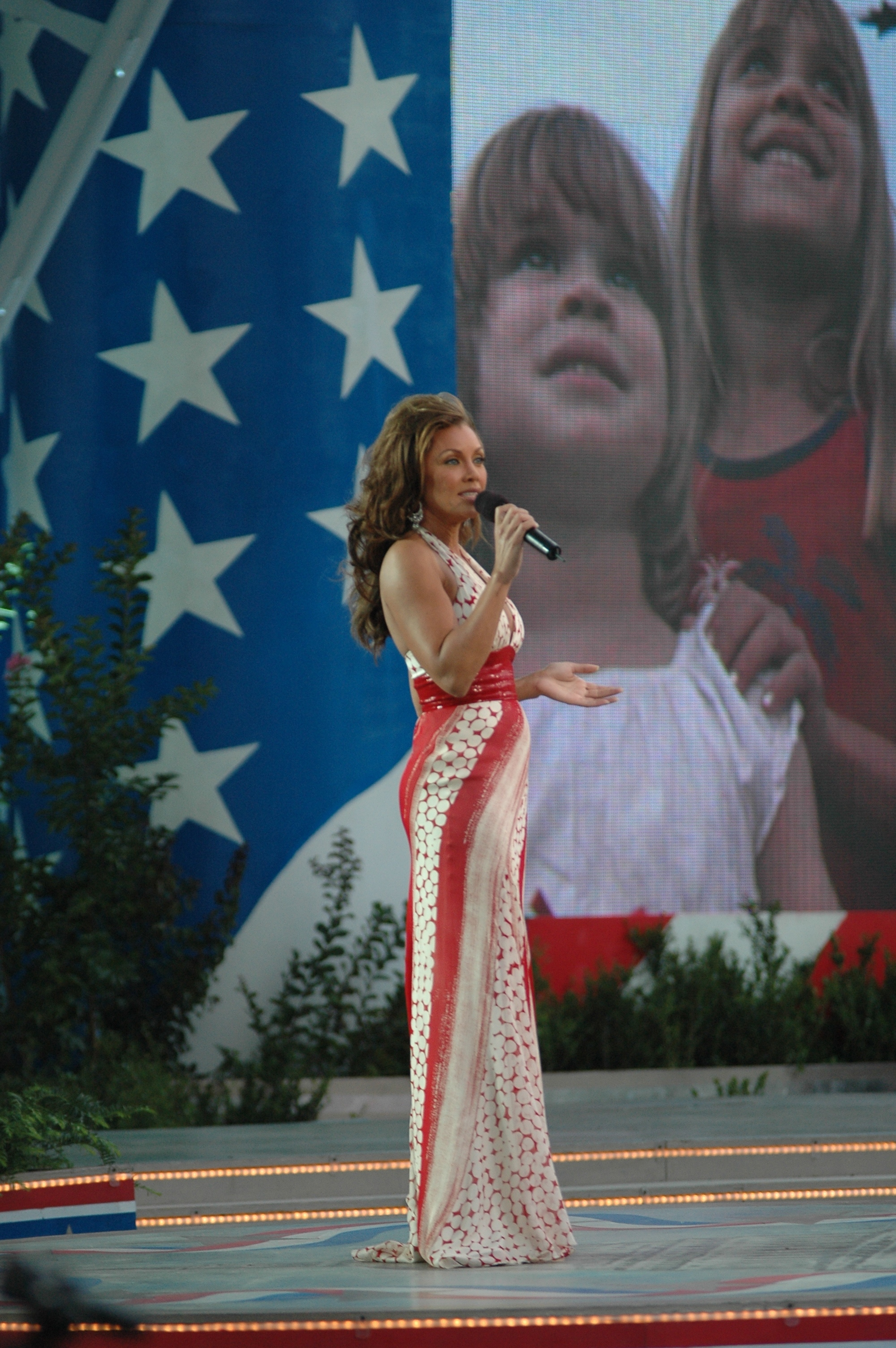 Vanessa Williams